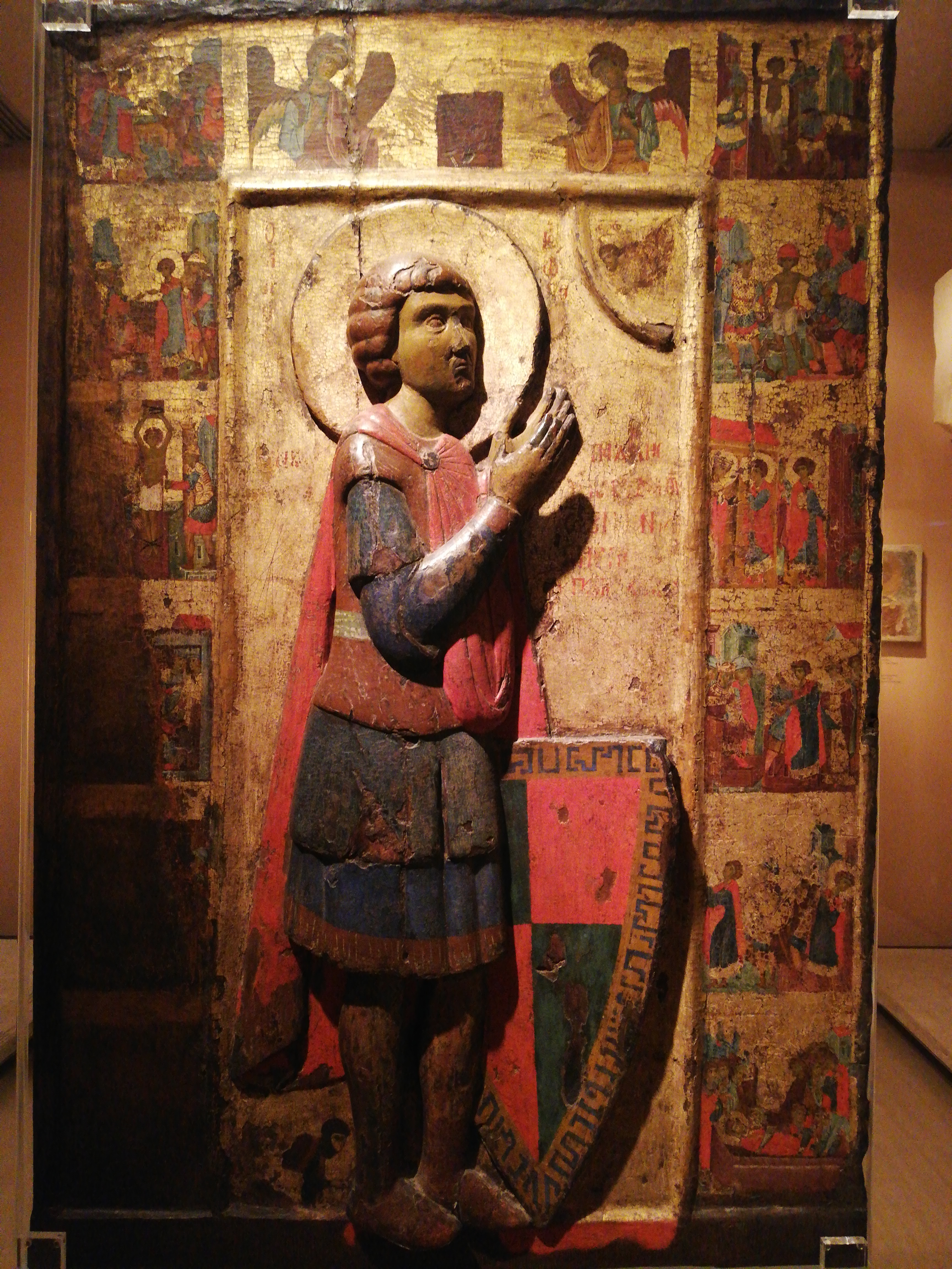 Icône de Saint Georges, 13e siècle